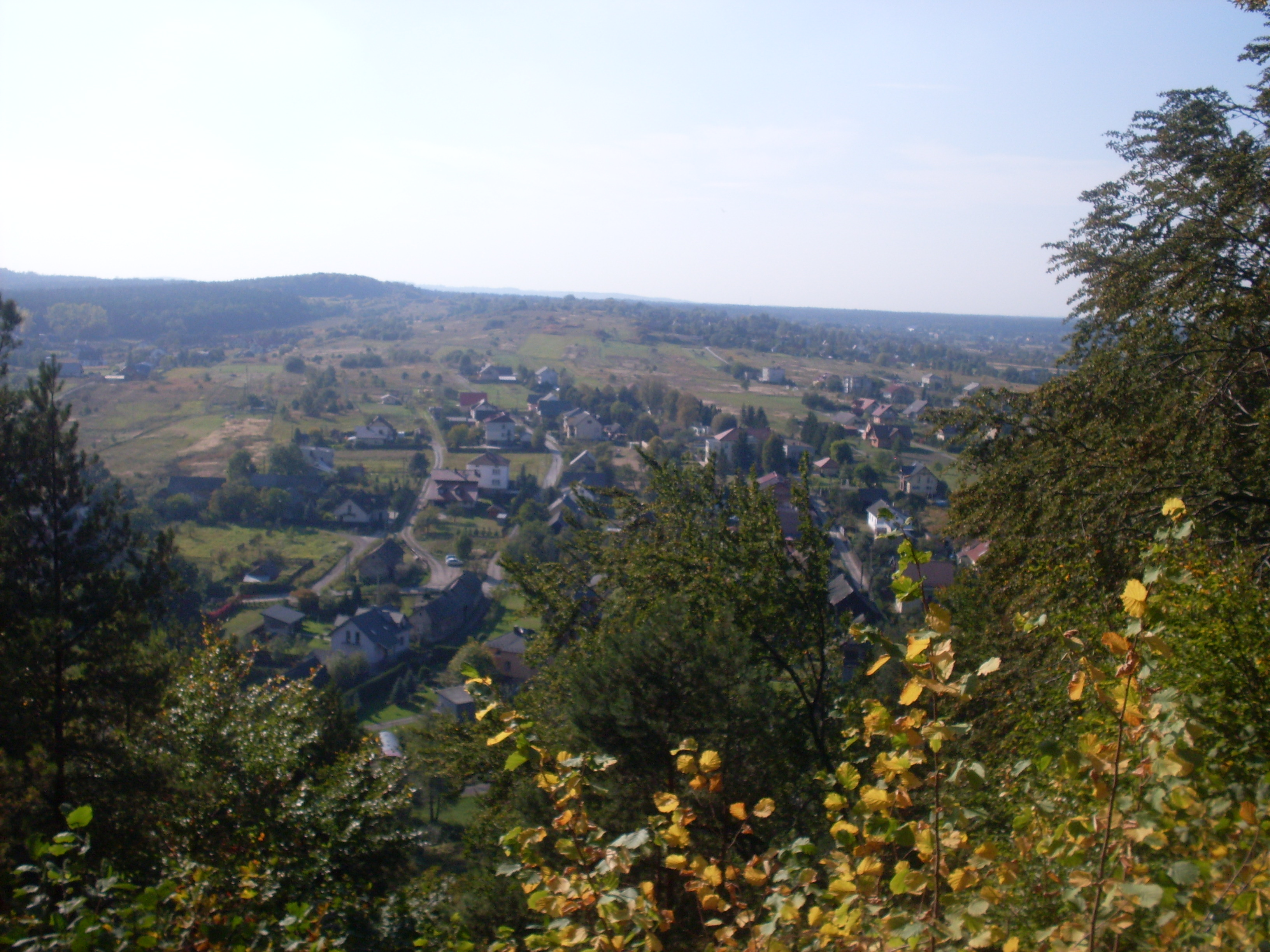 Widok z Buczyny w kierunku zachodnim